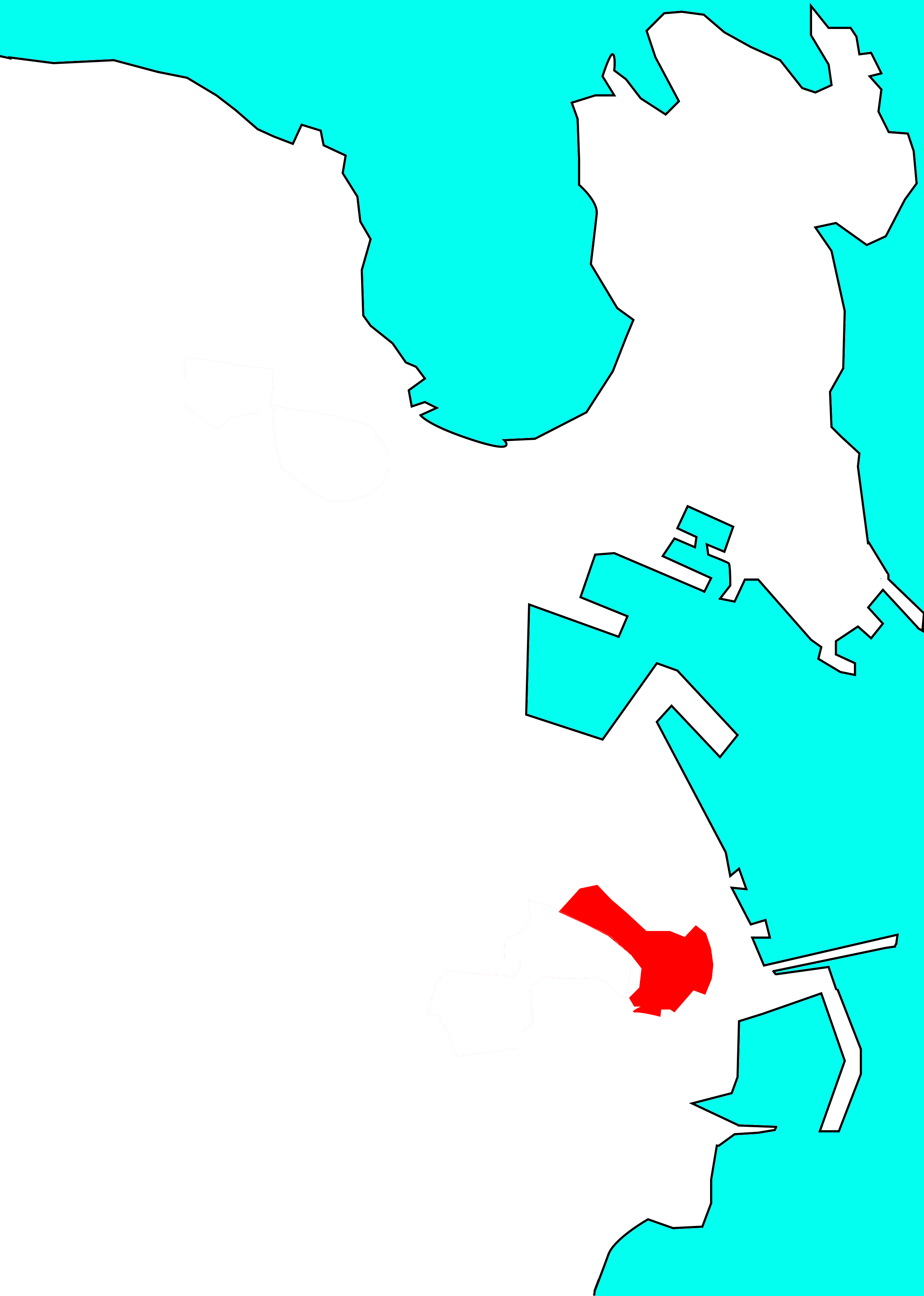 Situación dos Castros no concello da Coruña, segundo